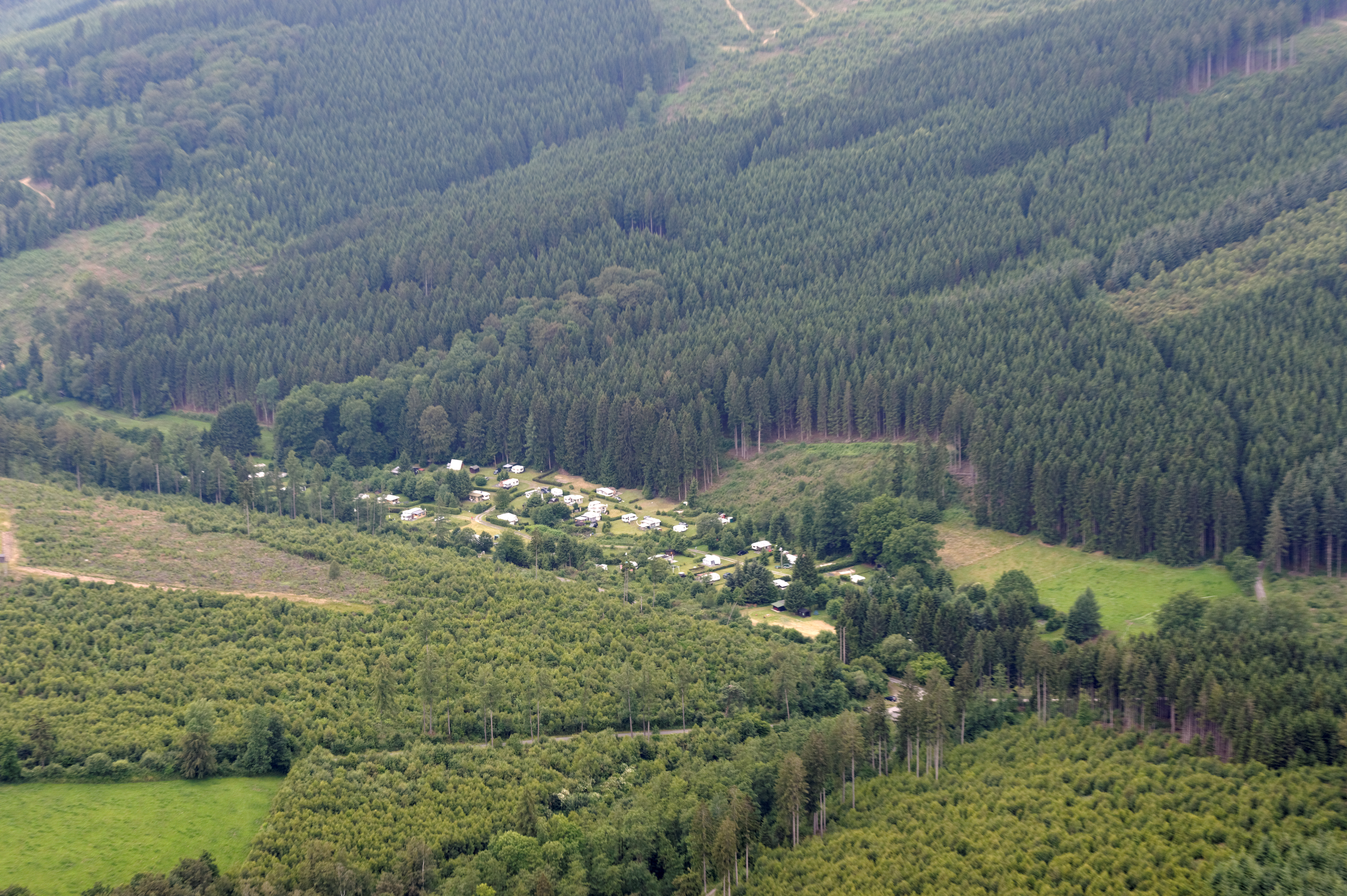 Fotoflug Sauerland-Nord. Sundern (Sauerland): Mettmecketal mit Campingplatz nordwestlich Westenfeld. The making of this document was supported by the Community-Budget of Wikimedia Germany.